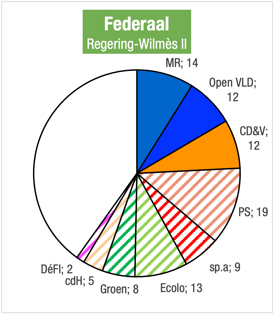 zetelverdeling Wilmès II